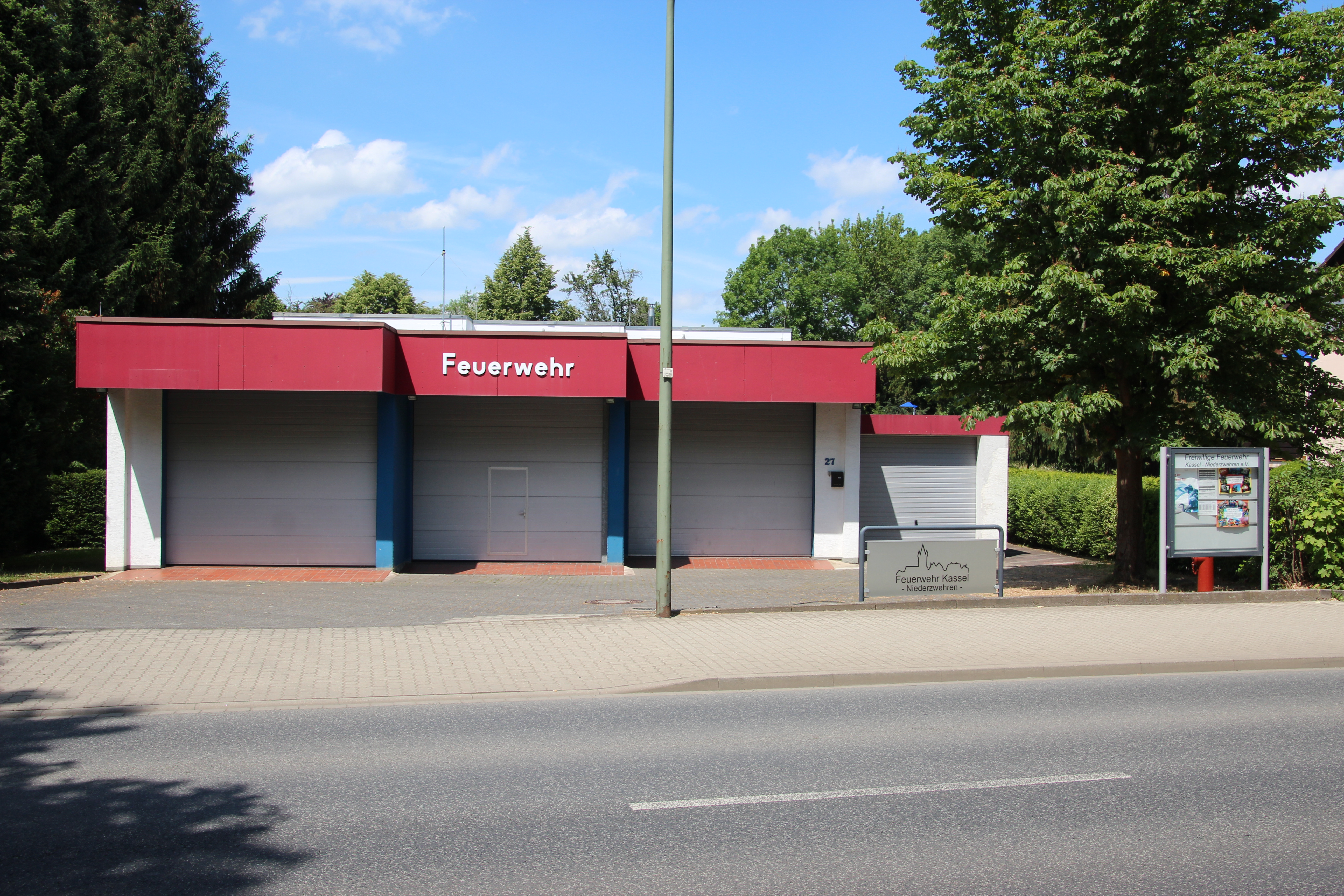 Wache der Freiwilligen Feuerwehr Kassel-Niederzwehren